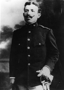 Николаос Ципурас